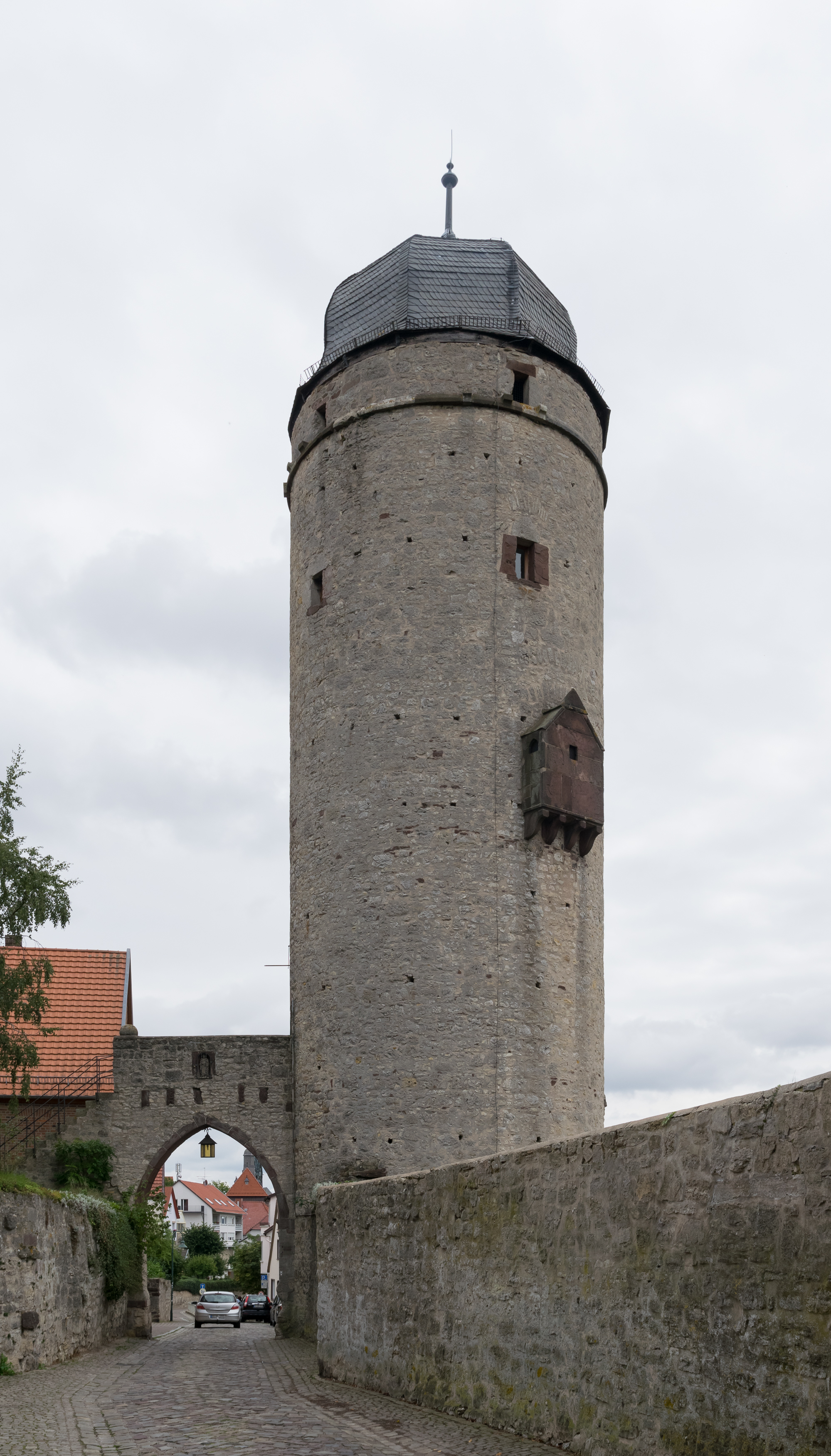 Spätmittelalterlicher "Sackturm" an der Stadtmauer von Warburg